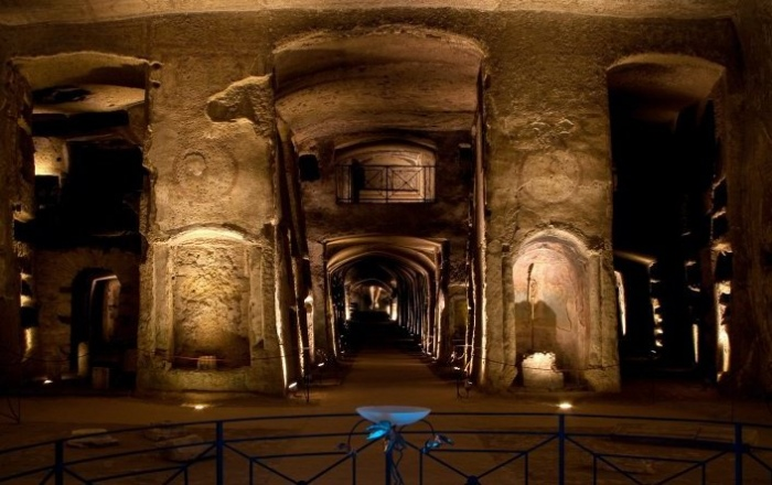 Vestibolo inferiore risalente al II - III sec. d.C.